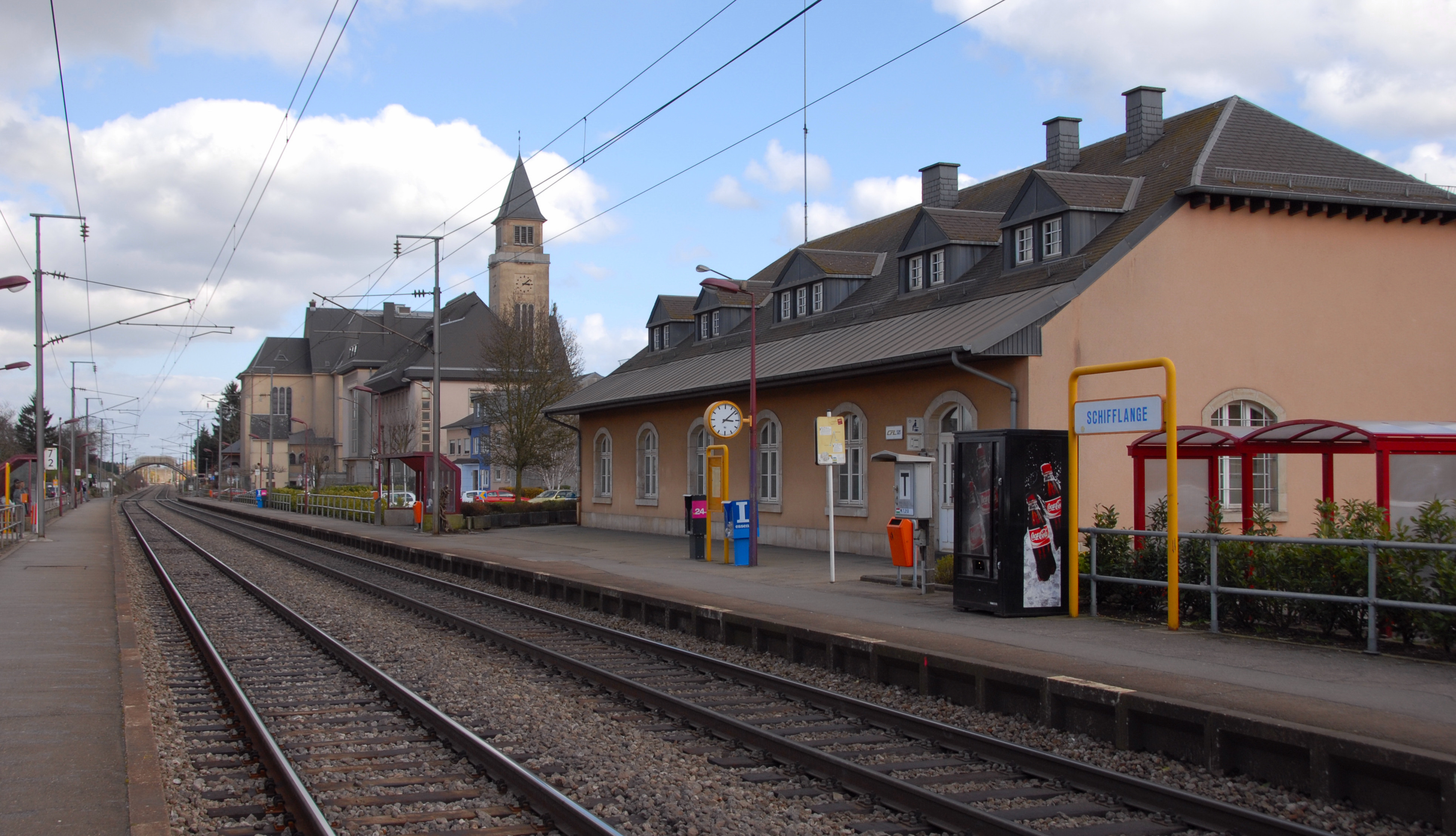 La gare et l'église de Schifflange (Luxembourg)